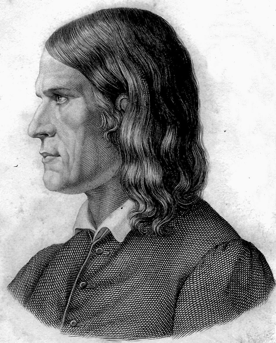 Portrait Friedrich Rückert, aus: Gedichte. Frankfurt am Main, Johann David Sauerländer, 1841.